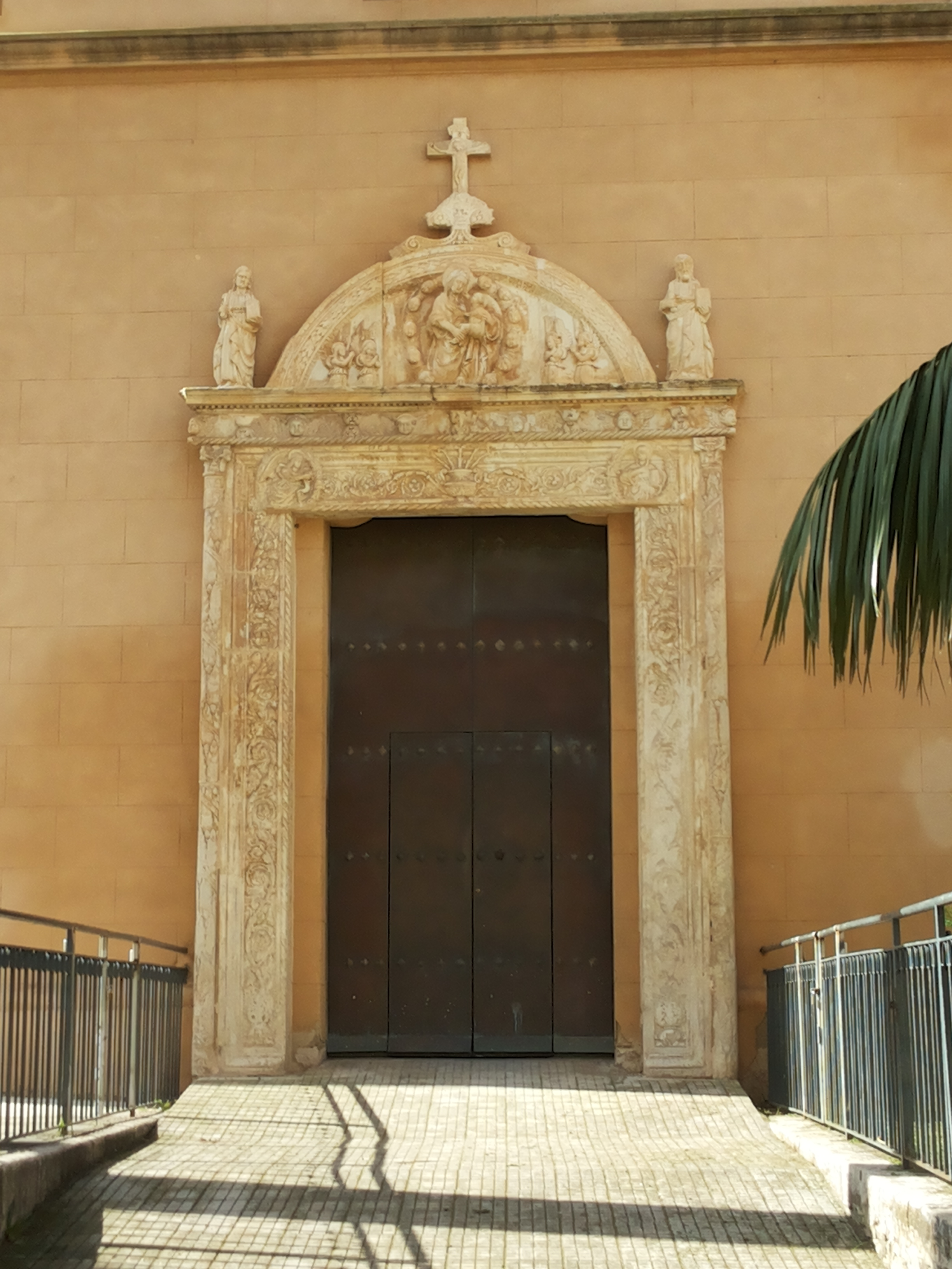 Chiesa Madre (Alcamo) - Portale laterale